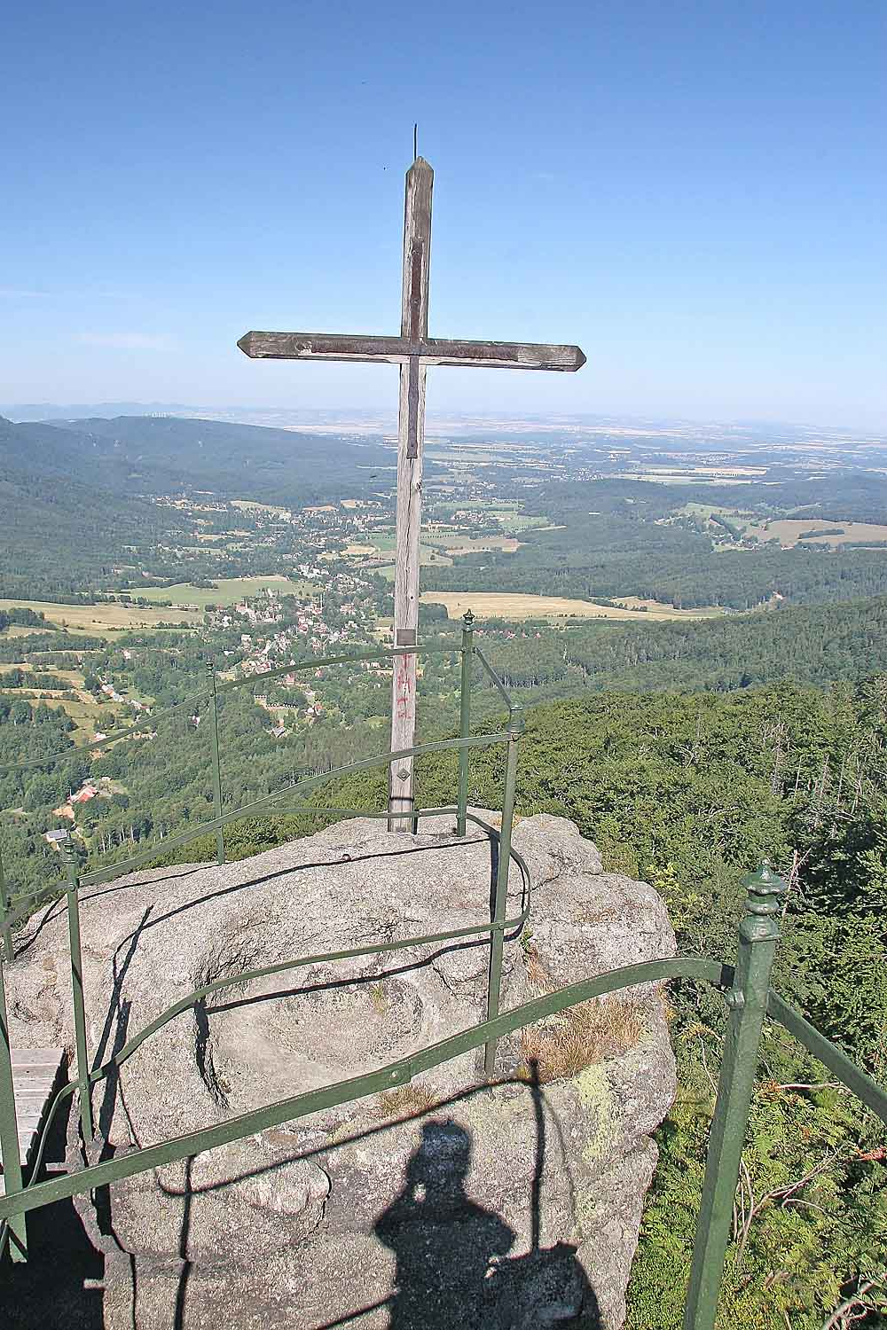 Paličník 944 m, Jizera Mountains, Czech Republic Autor:Prazak Date: 18. 7. 2006